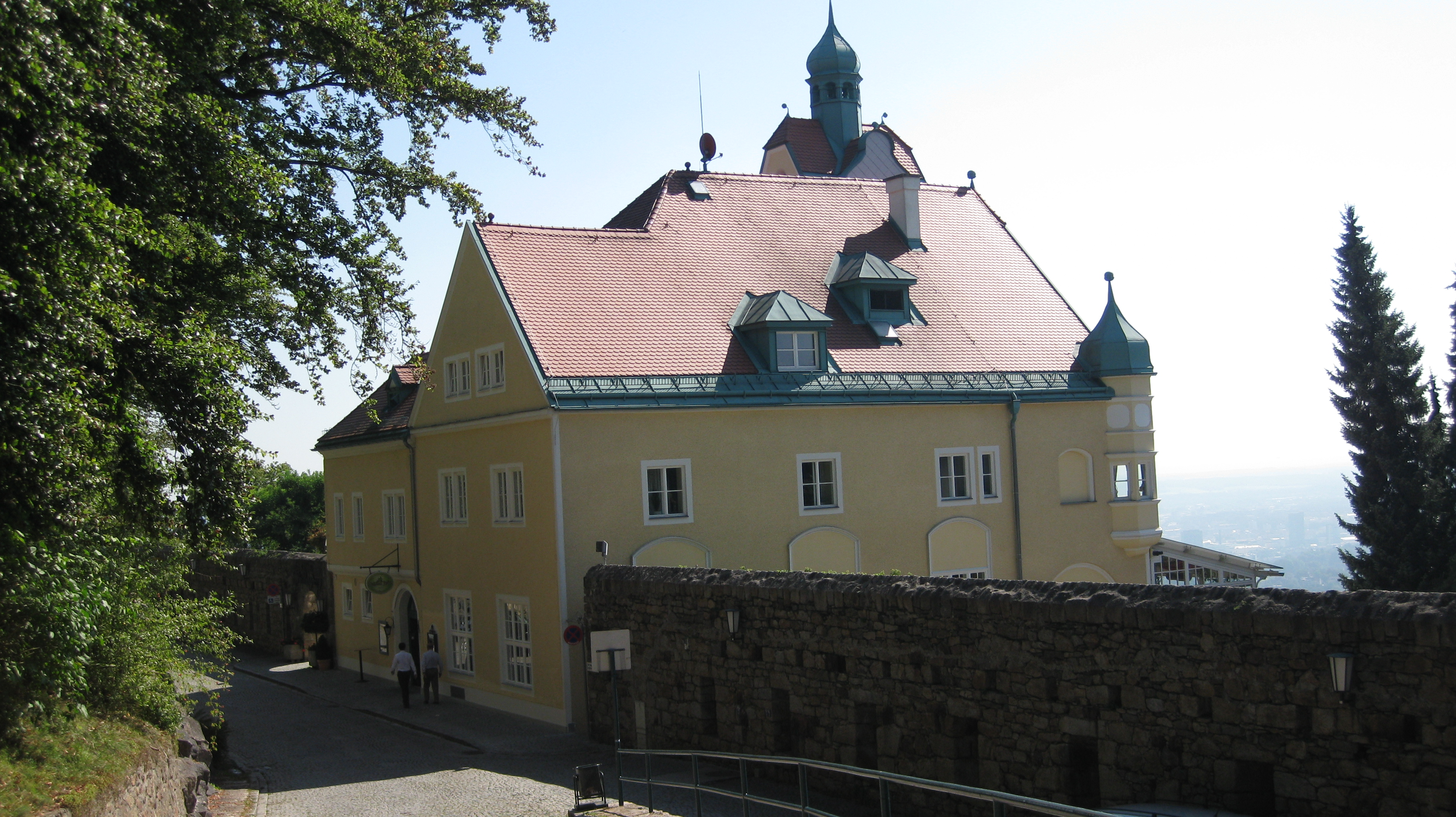 Linz Pöstlingberg Pöstlingberghotel mit Brunnen